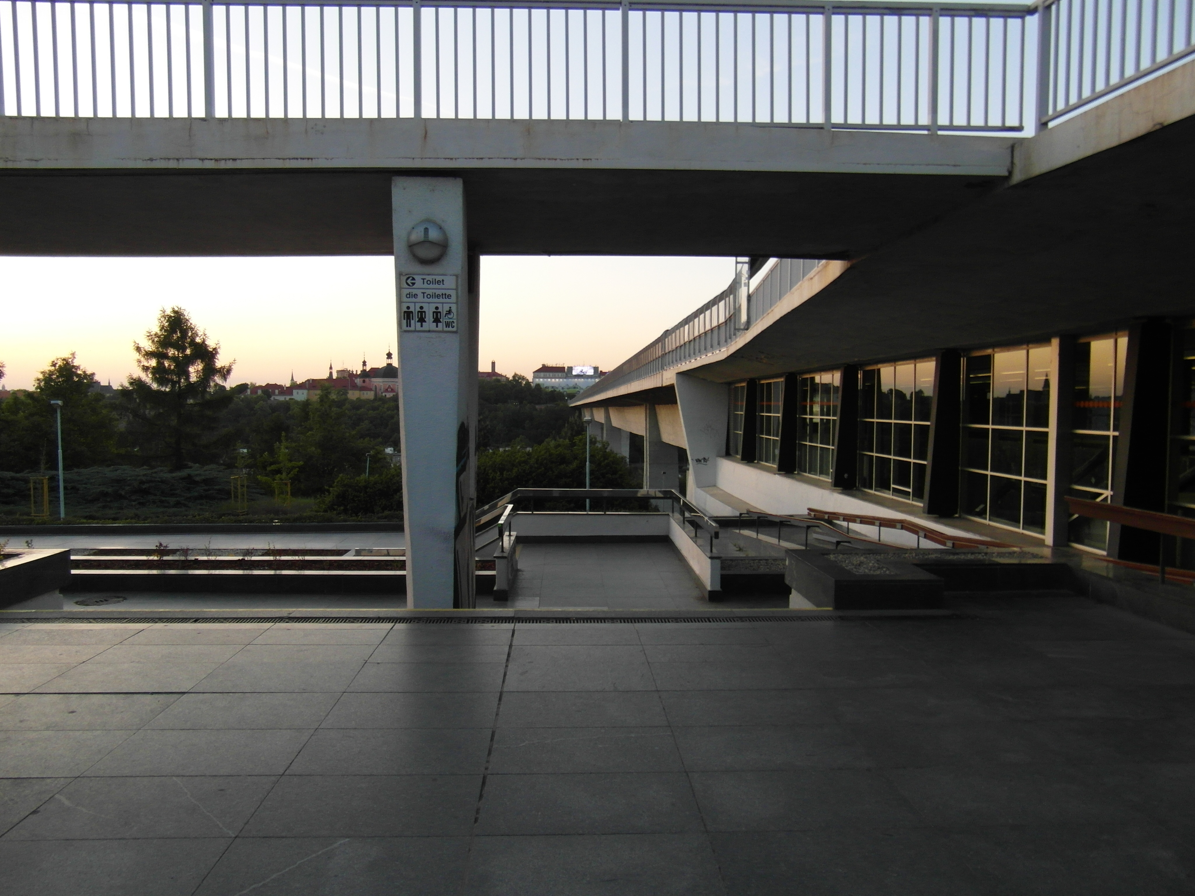 Praha - Metro - Vyšehrad